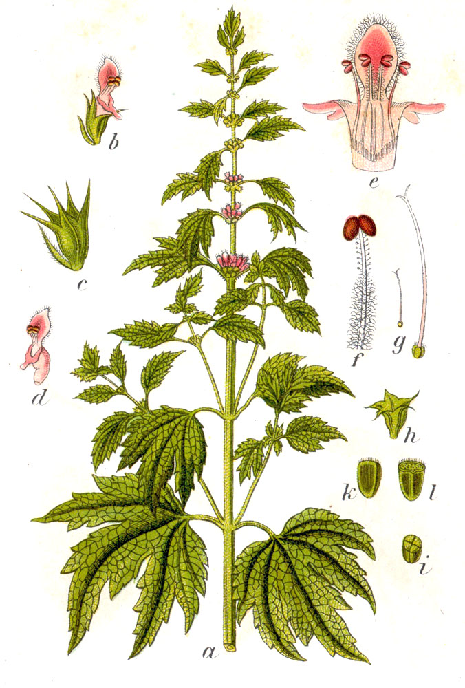 Leonurus cardiaca L. Original Caption Herzgespann, Leonurus cardiaca